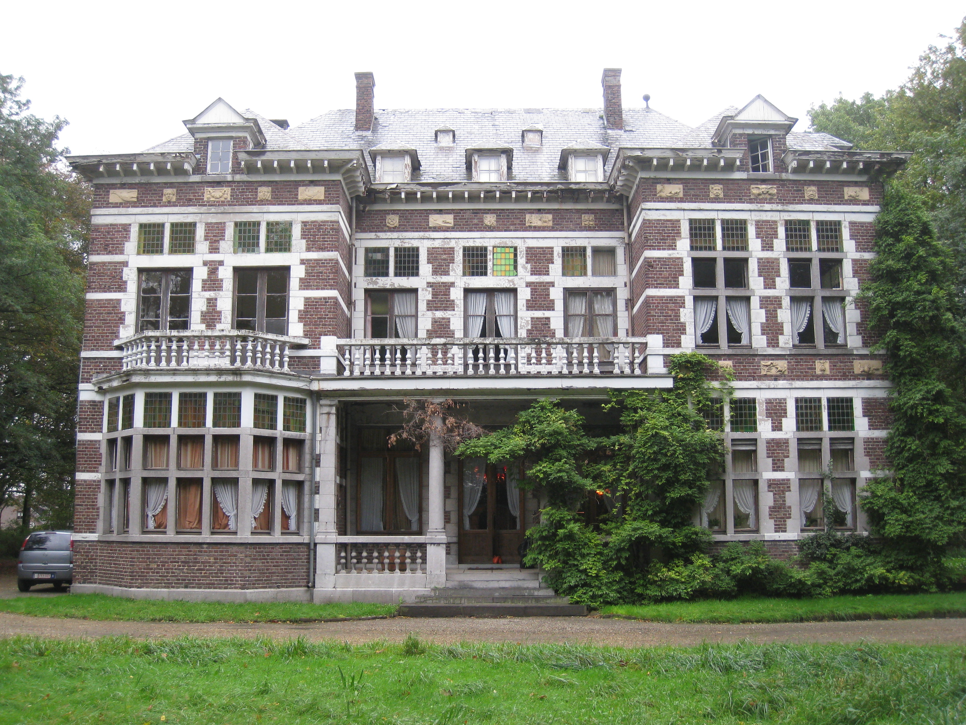 Basreliëfs in voorgevel directeursvilla, Zwartberg, België